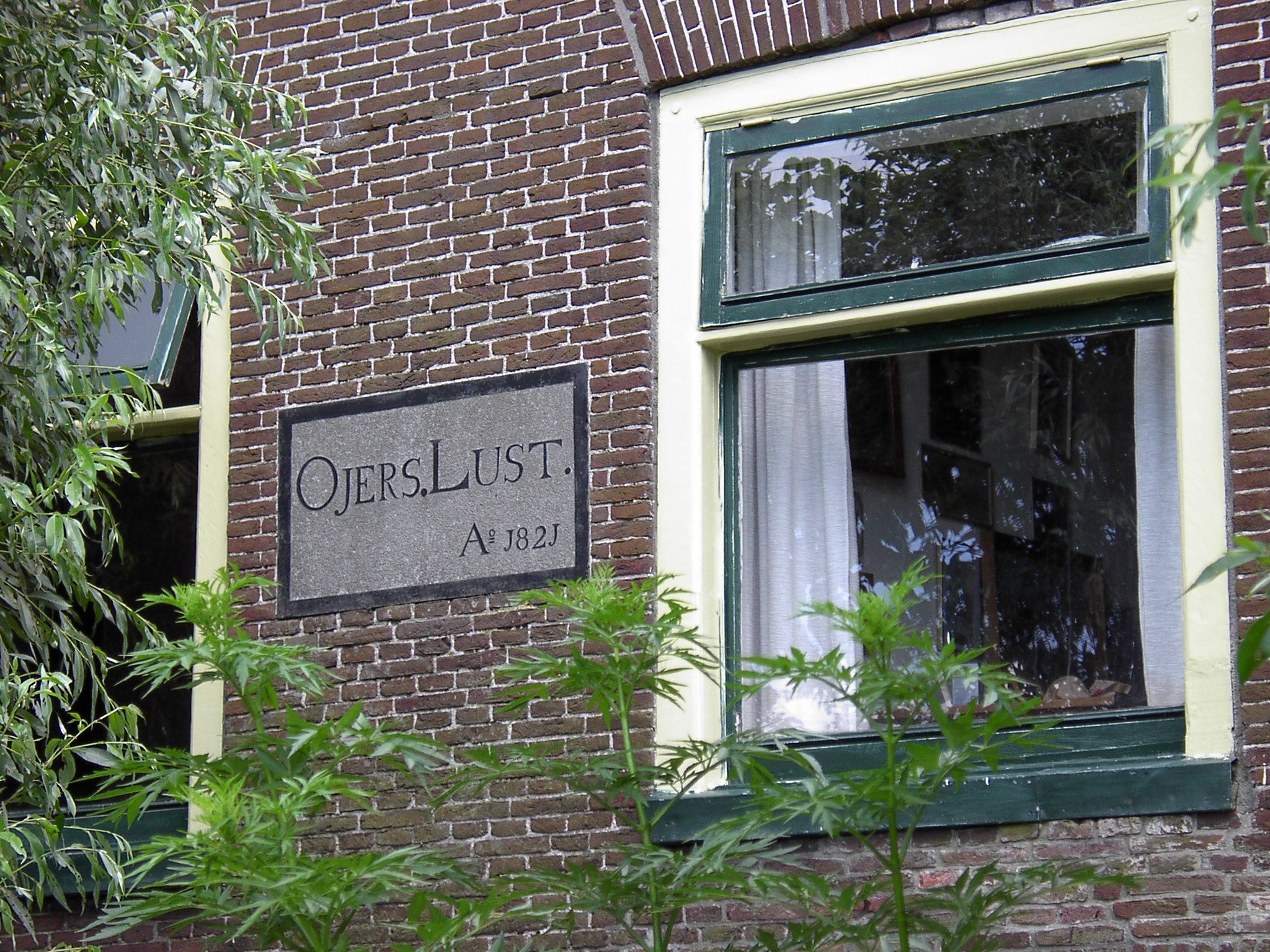 De gevelsteen van boerderij Ojerslust te Willeskop.